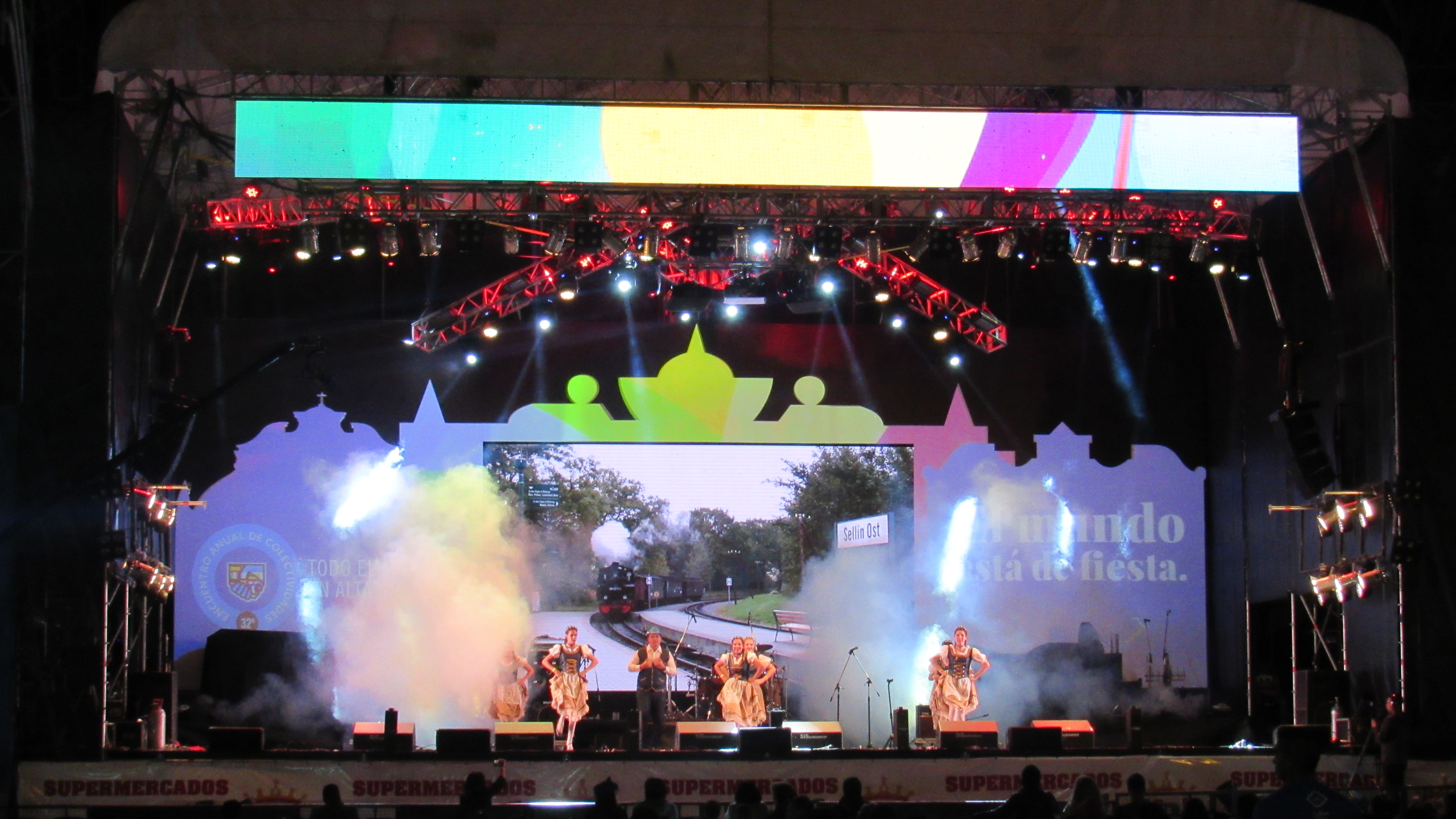 Escenario principal - XXXII Encuentro Anual de Colectividades Alta Gracia 2019 - Dia 2